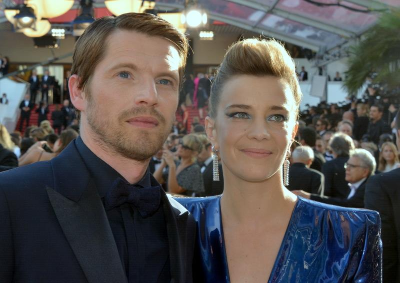 Pierre Deladonchamps et Céline Sallette au festival de Cannes